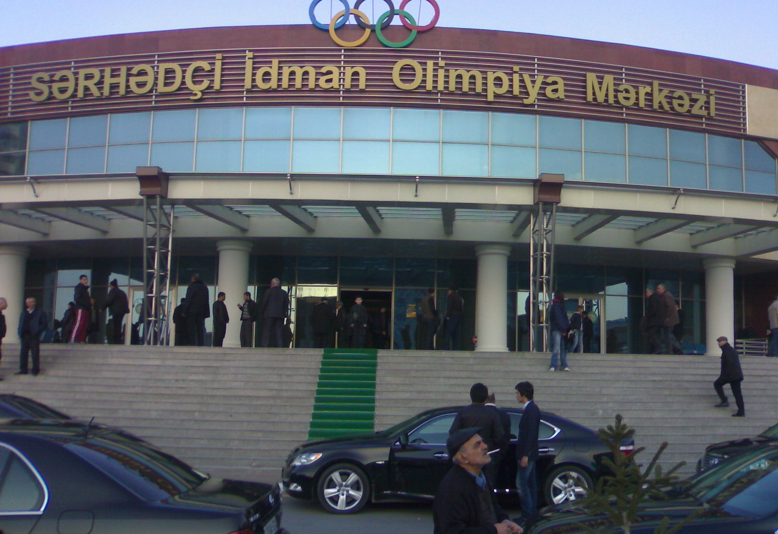 Bakı, Sərhədçi İdman Olimpiya Mərkəzi